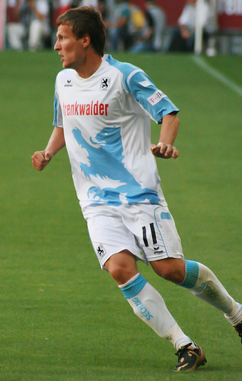 Fußballspieler Benjamin Lauth.